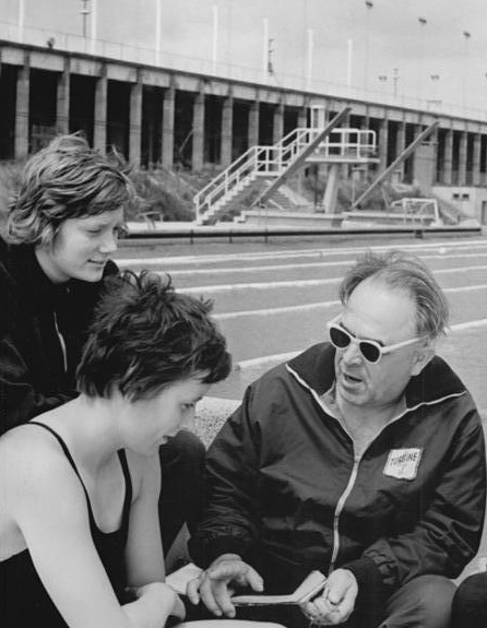 Gisela Weiss, Heide Zimmermann, Johannes Horlbeck (coach)